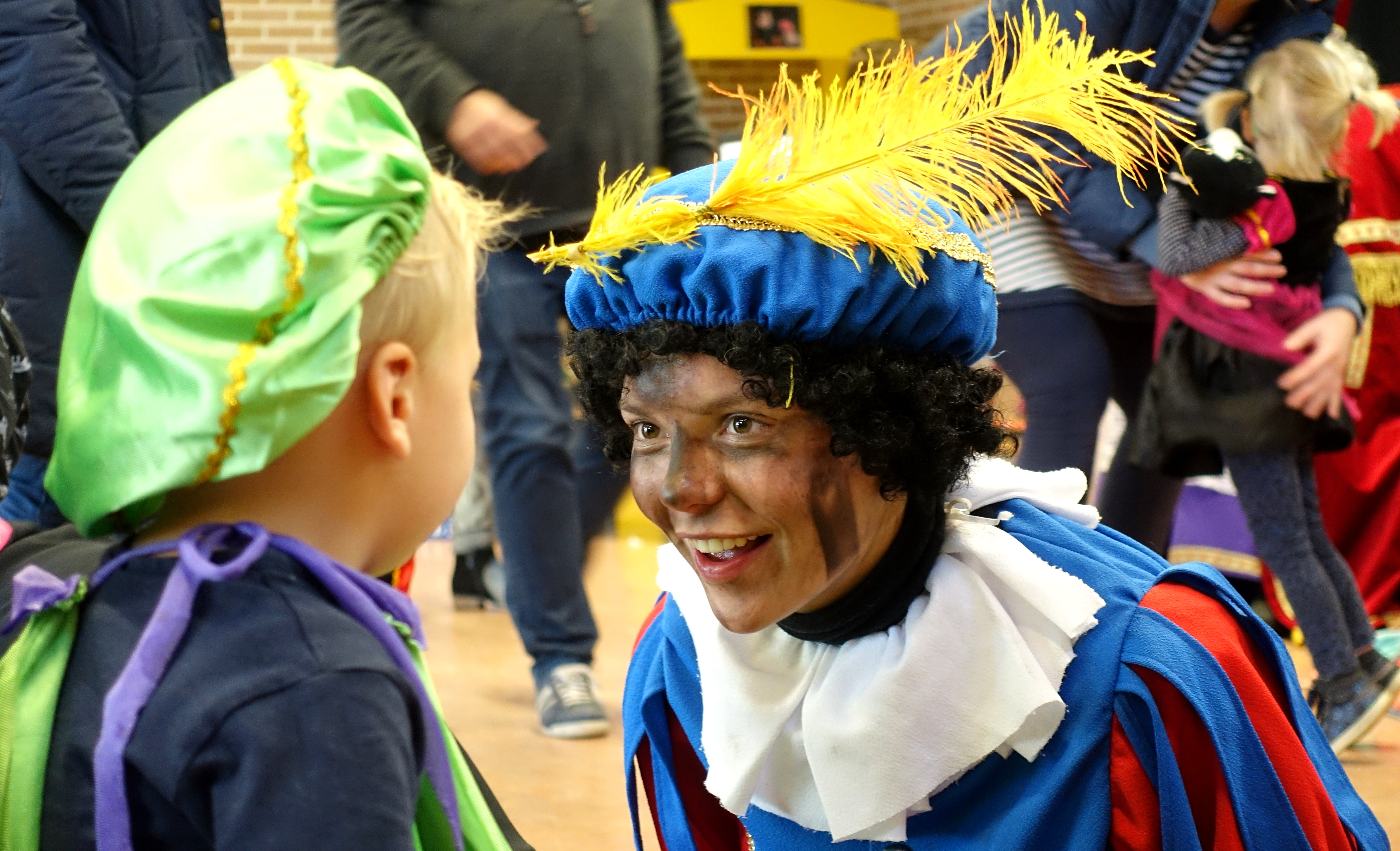 Ein roetveegpiet ("Rußfleckpiet") in einer Schule im Osten der Niederlande. Diese Figur ersetzt nach und nach den umstrittenen "Zwarte Piet", der pechschwarz geschminkt ist.